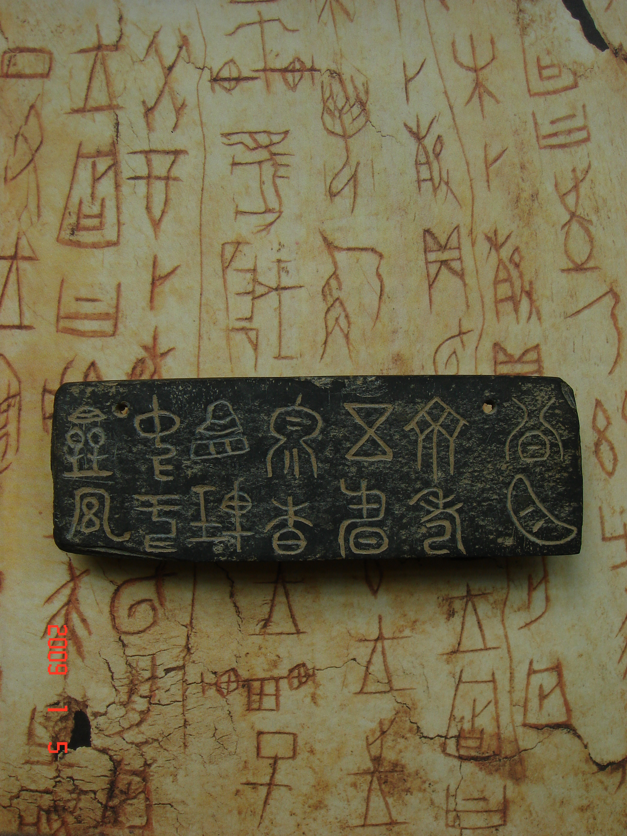 《释读一枚西周刻石石简》的实物照片